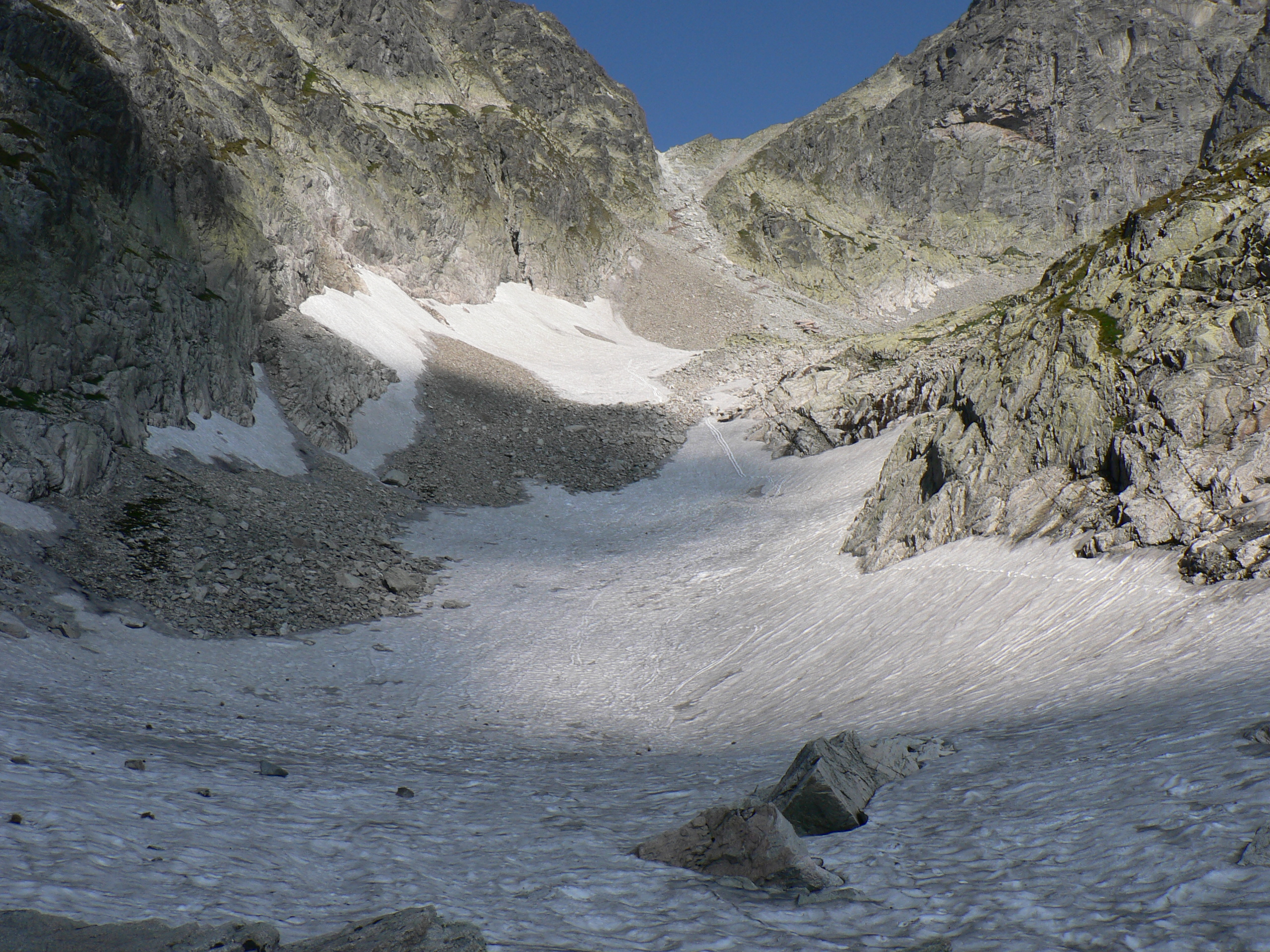 Lodowa Przełęcz ponad Dolinką Lodową